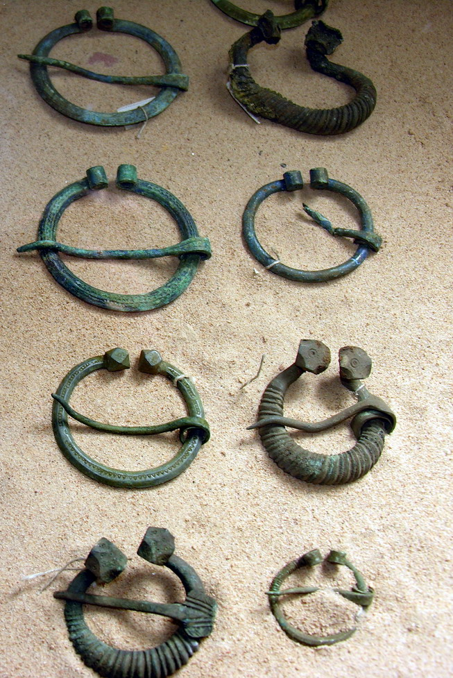 Įvairios segės iš Pavirvytės IX-XII a. senkapio Foto: Algirdas, 2006 m. birželio 8 d., Lietuva